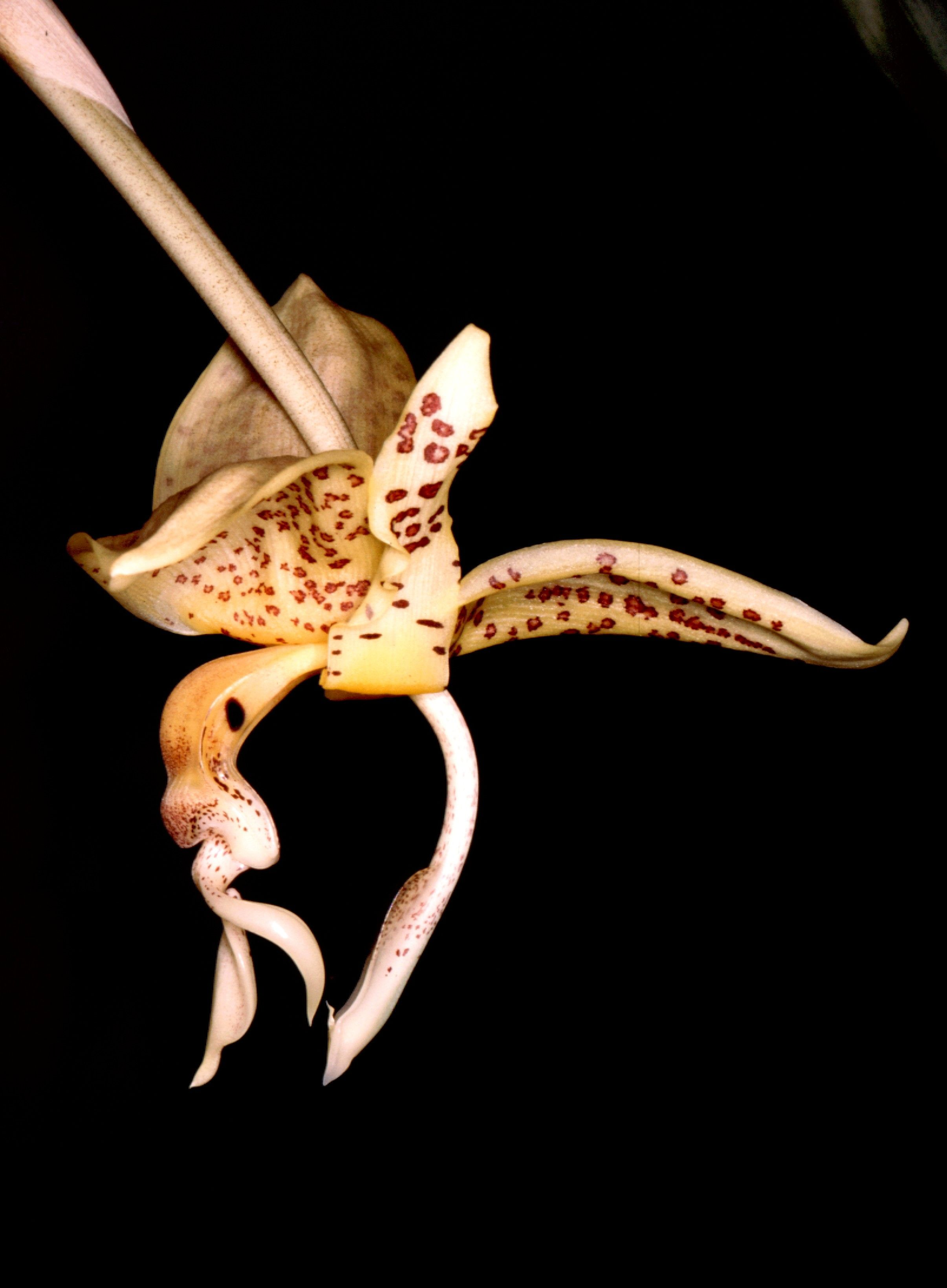 Stanhopea oculata